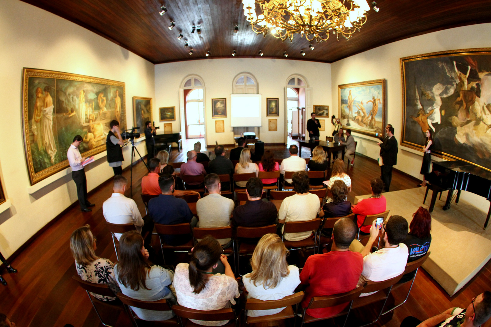 O Ministro da Cultura, Sérgio Sá Leitão, visitou, nesta segunda-feira (22), a Fundação Ernesto Frederico Scheffel, na cidade de Novo Hamburgo (RS). Na ocasião, o secretário Municipal de Cultura, Ralfe Cardoso, apresentou o plano de lançamento do Polo Audiovisual da cidade. Por meio da chamada pública de Coinvestimentos Regionais nº 01/2018, da Agência Nacional do Cinema (Ancine), a cidade receberá do Fundo Setorial Audiovisual (FSA) uma verba de R$ 5,65 milhões de reais, além de R$ 1,45 milhão da própria prefeitura. A Ancine é uma das entidades vinculadas ao Ministério da Cultura (MinC). O projeto tem como objetivo desenvolver atividades relacionadas ao audiovisual na região, dentro de cinco eixos de atuação: profissionalização, responsabilidade sociocultural, formação de público, estabelecimento da rede audiovisual e fomento da atividade. Isso inclui um laboratório com espaço e equipamentos de alta qualidade, um centro de formação em parceria com a Fundação Cinema do Rio Grande do Sul (Fundacine), mostras e exibições abertas à comunidade e a abertura de editais para estimular as produções. "Novo Hamburgo está mudando a matriz econômica, de uma cidade de indústria de calçados para um polo audiovisual, buscando na economia criativa uma maneira de reinventar e estimular a cultura, além de gerar empregos e ter uma relevância no audiovisual não só em nível local, mas também estadual e até nacional", afirmou o ministro. 23/10/2018 Fotos: Ronaldo Caldas/Ascom/MinC